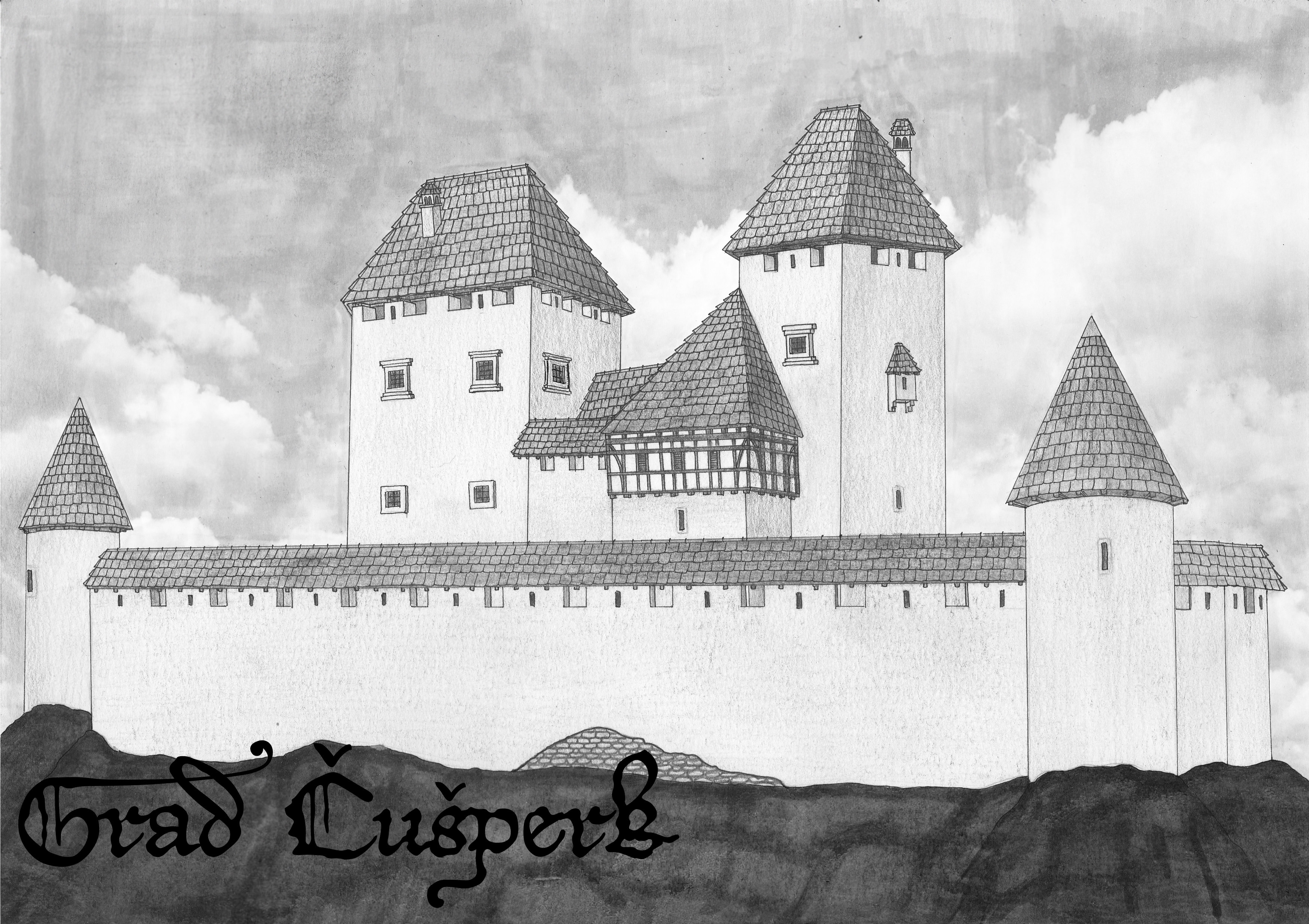 Poskus rekonstrukcije gradu Čušperk v 15.stol.